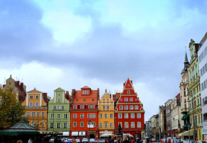 Wrocław, plac Solny